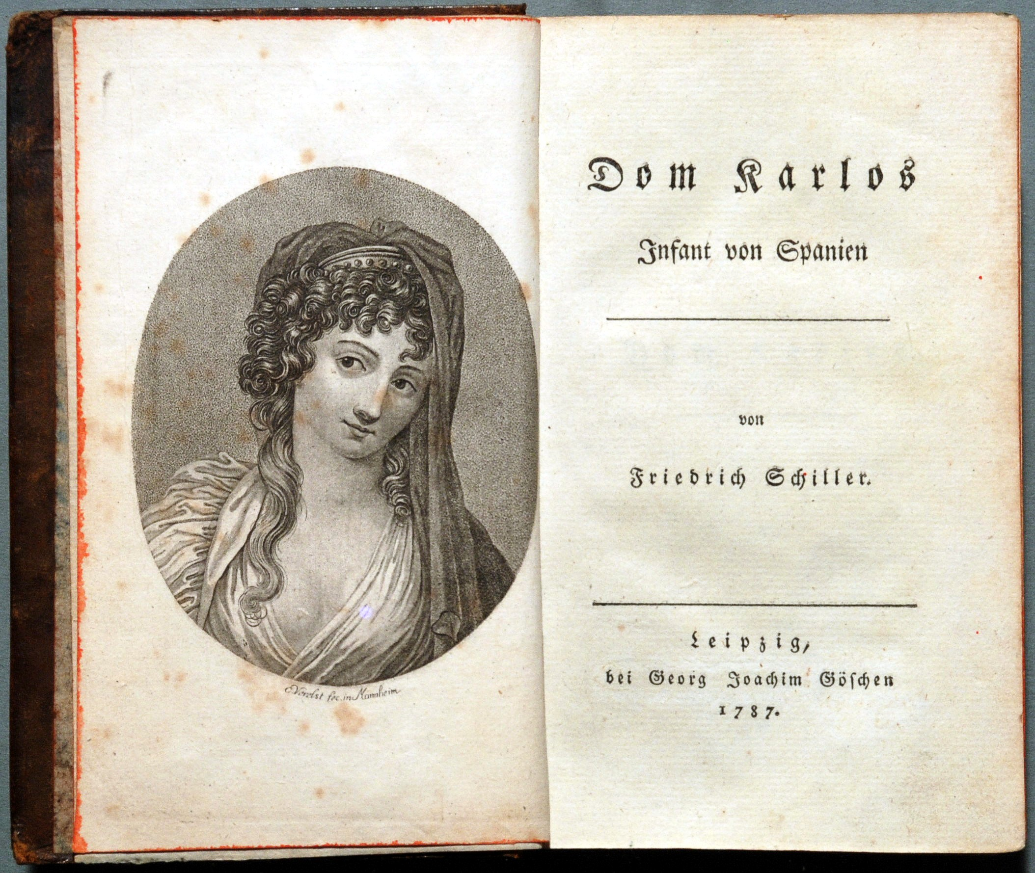 Schiller, Friedrich: Dom [Don] Karlos. Infant von Spanien. Leipzig: Georg Joachim Göschen 1787, Titelkupfer von Egid Verhelst ("EVerelst fec. in Mannheim") + Titel + 505 Seiten einschließlich Vortitel + 1 nicht paginiertes Titelblatt "Zweite Abtheilung" mit dem Vermerk: "Dieser Titel wird vor den 3ten Akt gebunden."[1] + 1 leere Seite + 1 Blatt Druckfehler. Erstdruck (Wilpert/Gühring² 17)